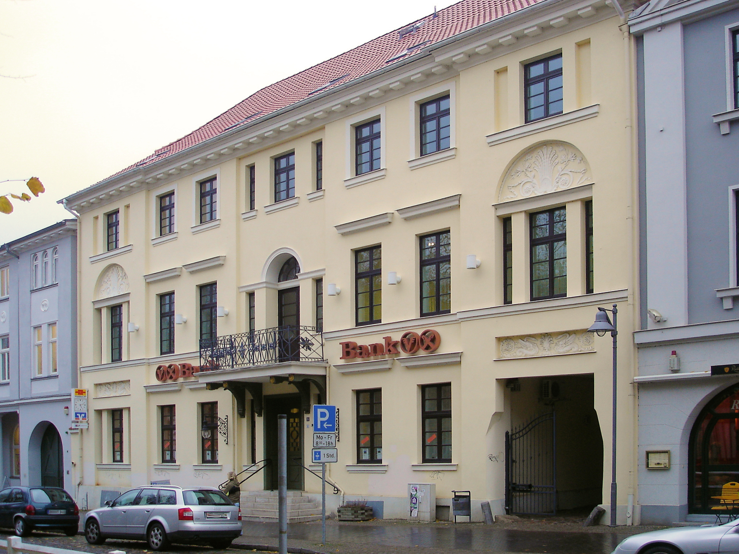 Ehemaliges Wohnhaus des Großherzoglichen Kochs Gaetano Medini in Bad Doberan, Landkreis Rostock, Mecklenburg-Vorpommern